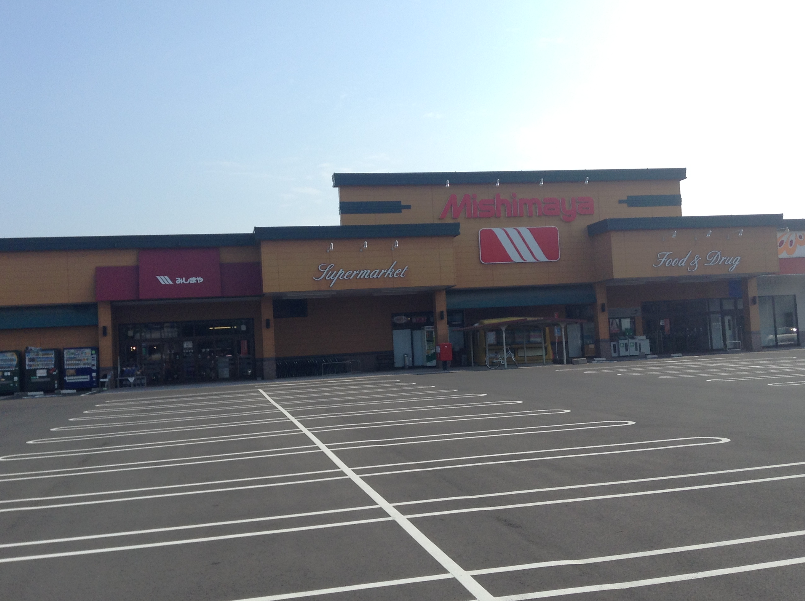 みしまや上の木店